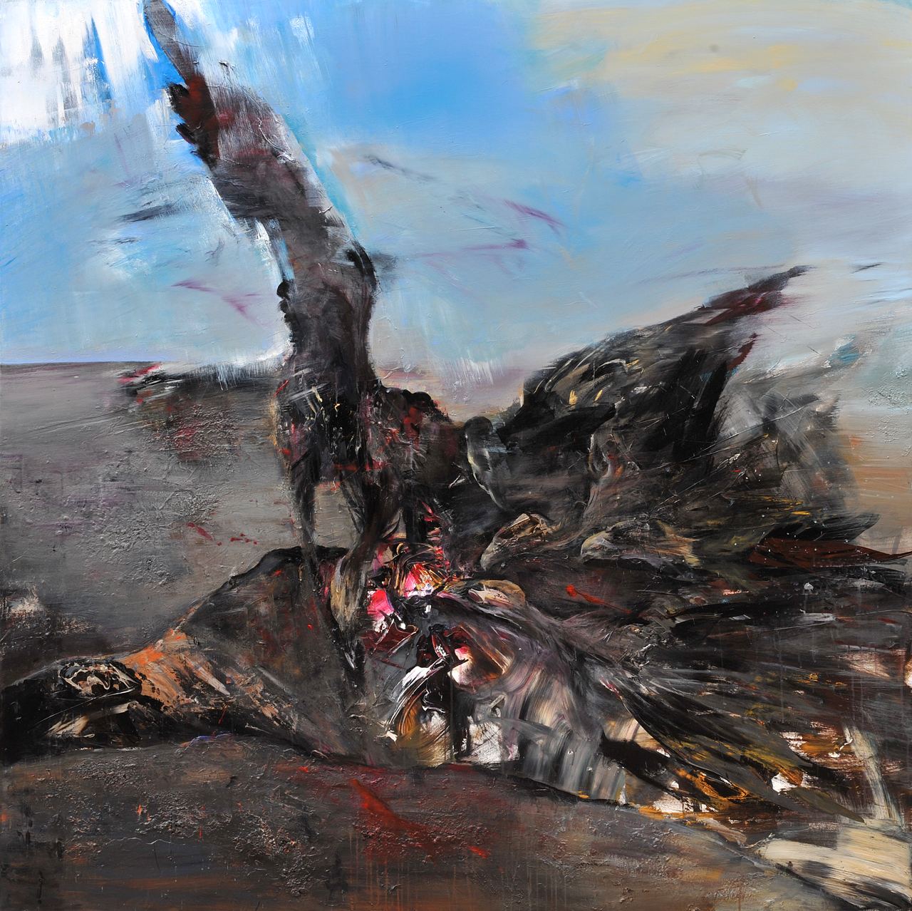 Franta, Supi (2014), akryl, plátno 200 x 200 cm